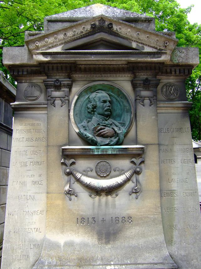 Tombe d'Auguste Maquet au Pere Lachaise. PARIS